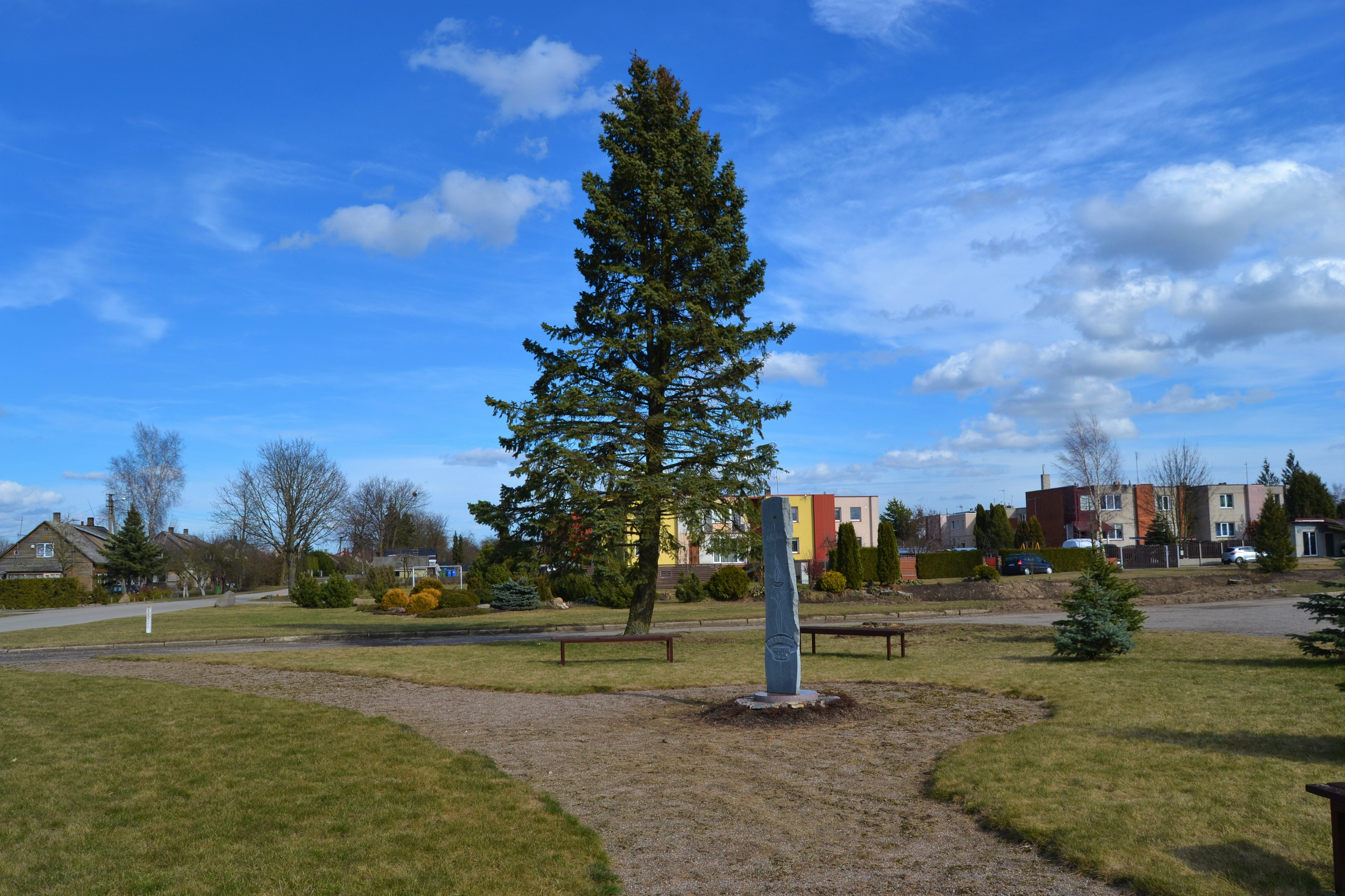 Baraginės kaimo 225 metų jubiliejui paminėti pastatytas paminklas.